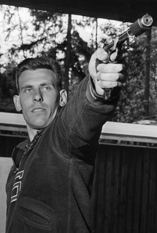 Pentti Linnosvuo